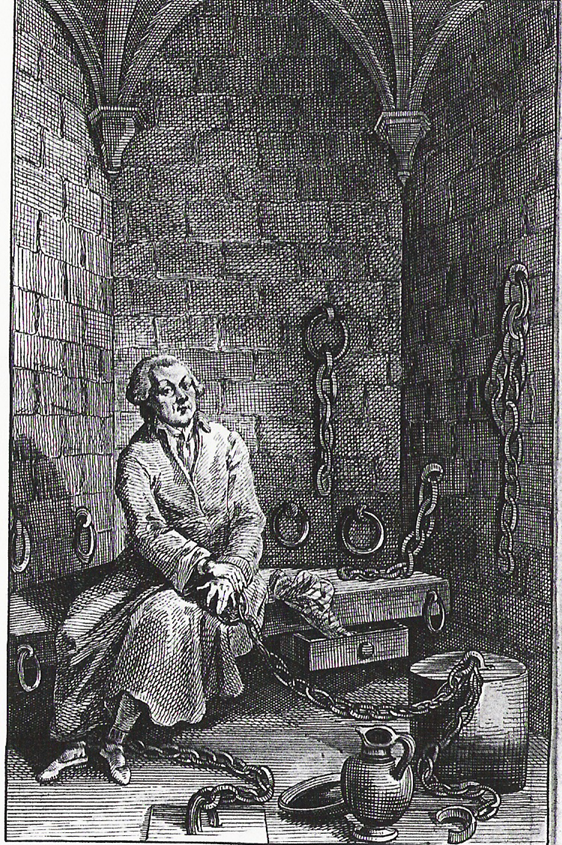 Le Prévôt de Beaumont als Staatsgefangener im Donjon